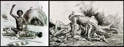 Succion de piedras